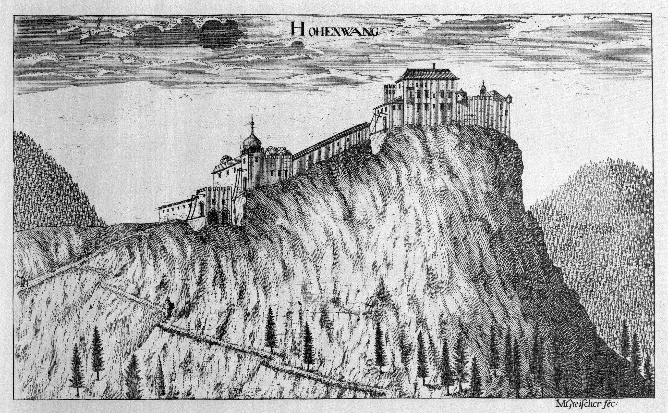 G. M. Vischers Käyserlichen Geographi, Topographia Ducatus Stiriae, Das ist: Eigentliche Delineation / und Abbildung aller Städte / Schlösser / Marcktfleck / Lustgärten / Probsteyen / Stiffter / Clöster und Kirchen / so es sich im Herzogthumb Steyrmarck befinden; Und anjetzo Umb einen billichen Preyß zu finden seynd Bey Johann Bitsch Universitäts Buchhandlern / Auff dem Juden=Platz bey der guldenen Saulen. Graz 1681 Die Nummerierung der Dateien folgt der alphabetischen Reihung der Ortsnamen